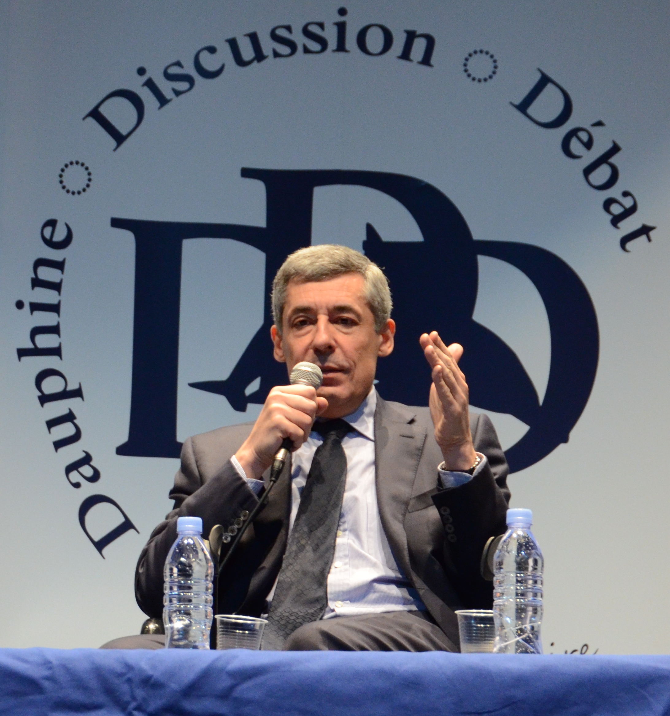 Henri Guaino, Conseiller spécial de Nicolas Sarkozy lors d'un débat à l'Université Paris-Dauphine, le 22 février 2012, organisé par l'association Dauphine Discussion Débat.